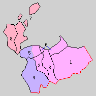 鹿児島県出水郡域の町村制時点の町村。